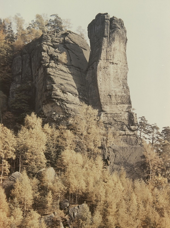 Original image description from the Deutsche Fotothek Teufelsturm bei Schmilka von Südwesten